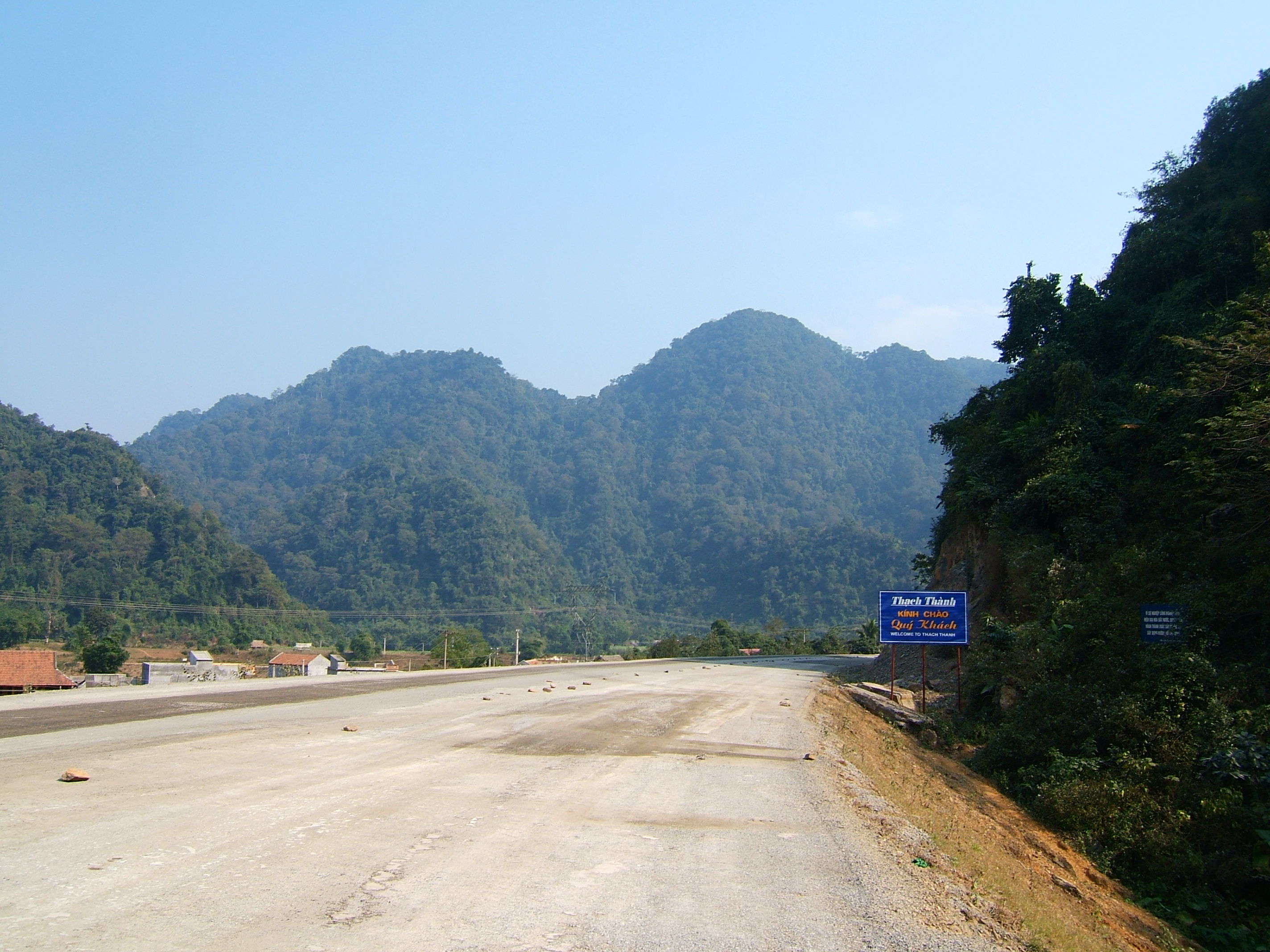 Đường vào huyện Thạch Thành, Thanh Hóa